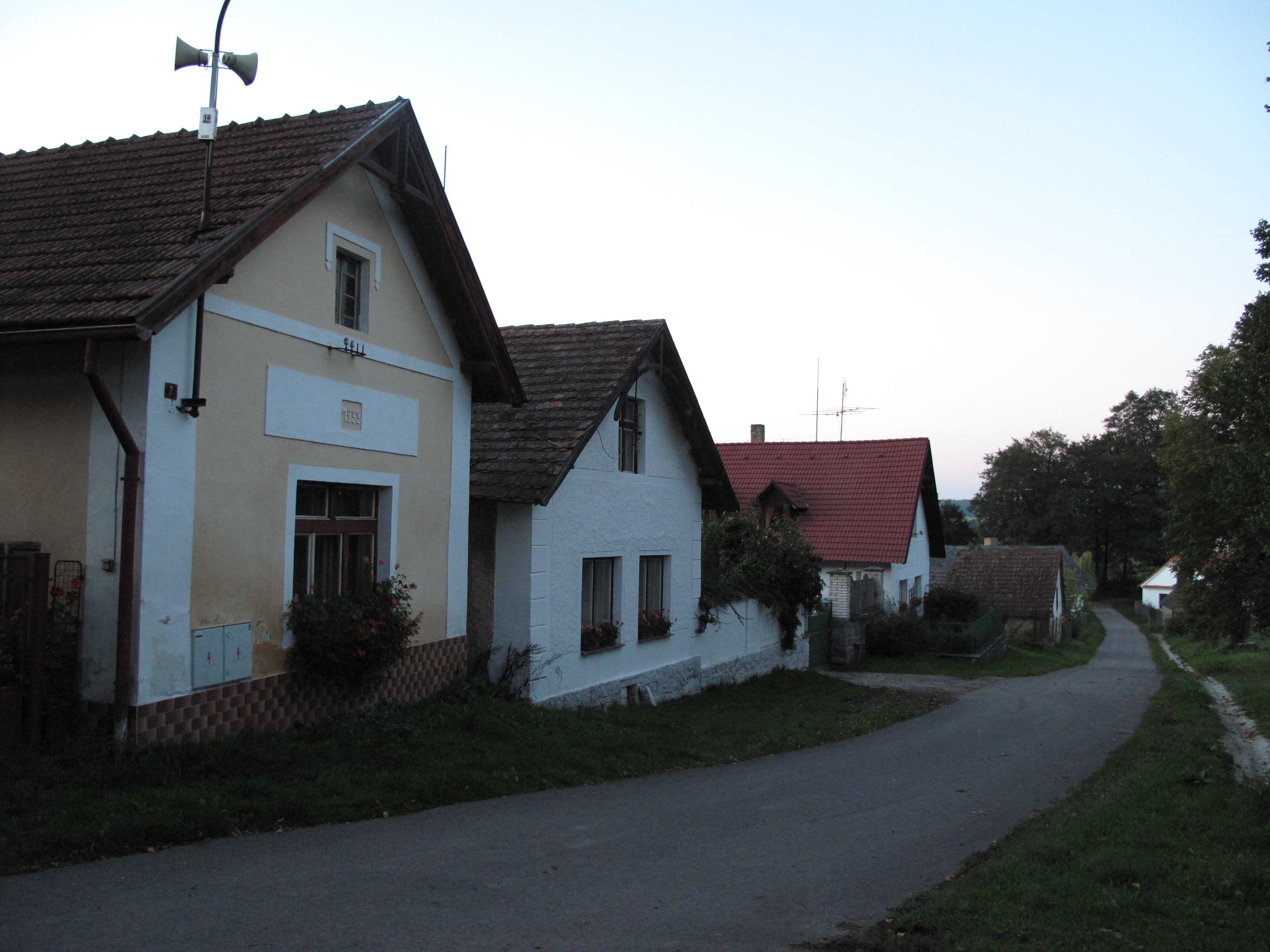 Domy u cesty ve Střížovicích. Okres Strakonice, Česká republika.